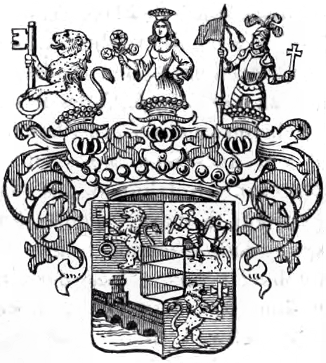 Wappen der Grafen von Königsmarck 1817 unter Beilegung des schwedischen Wappens